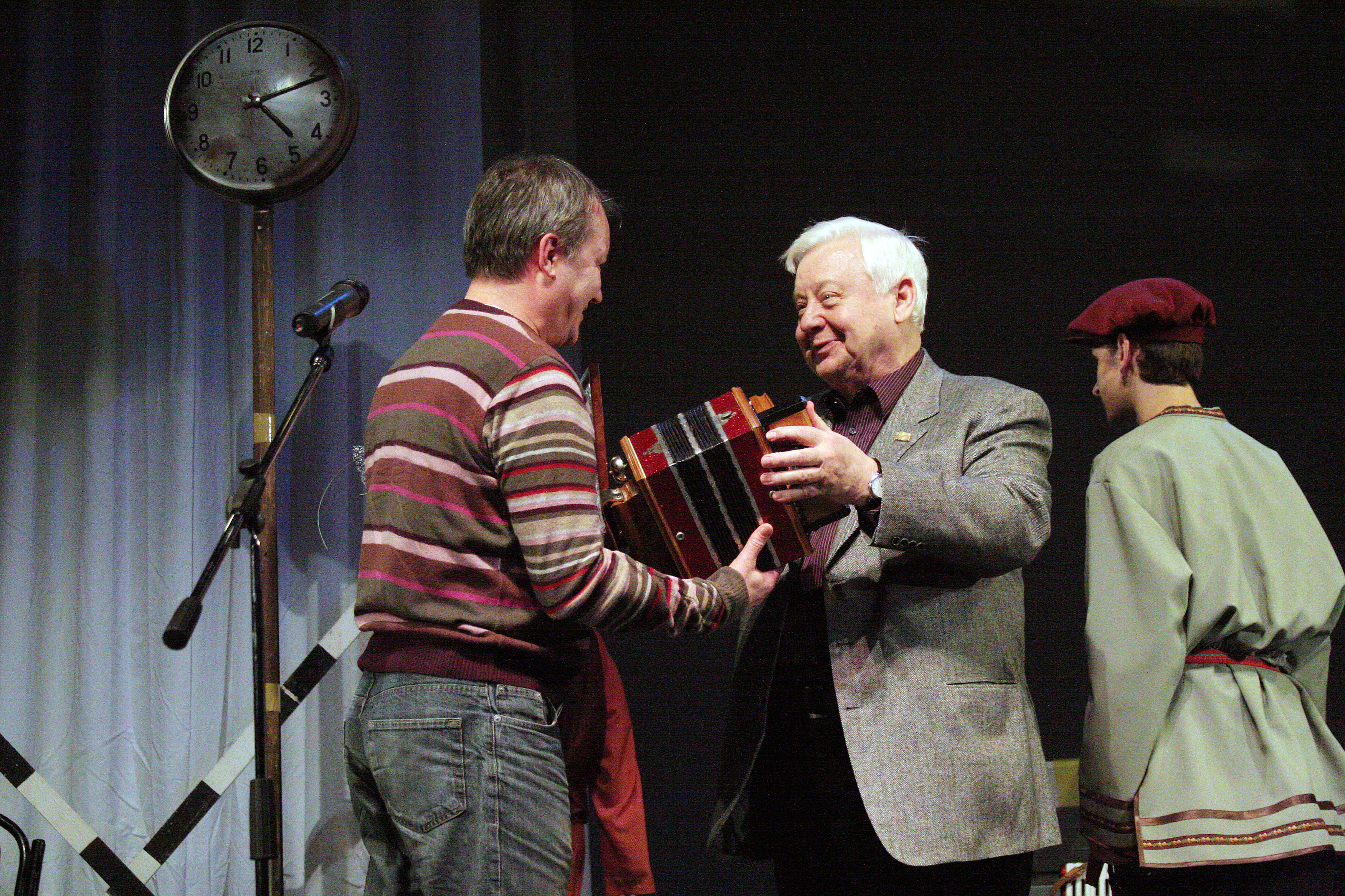 Президент фестиваля "Саратовские страдания" Олег Табаков вручает приз режиссеру Павлу Печенкину.